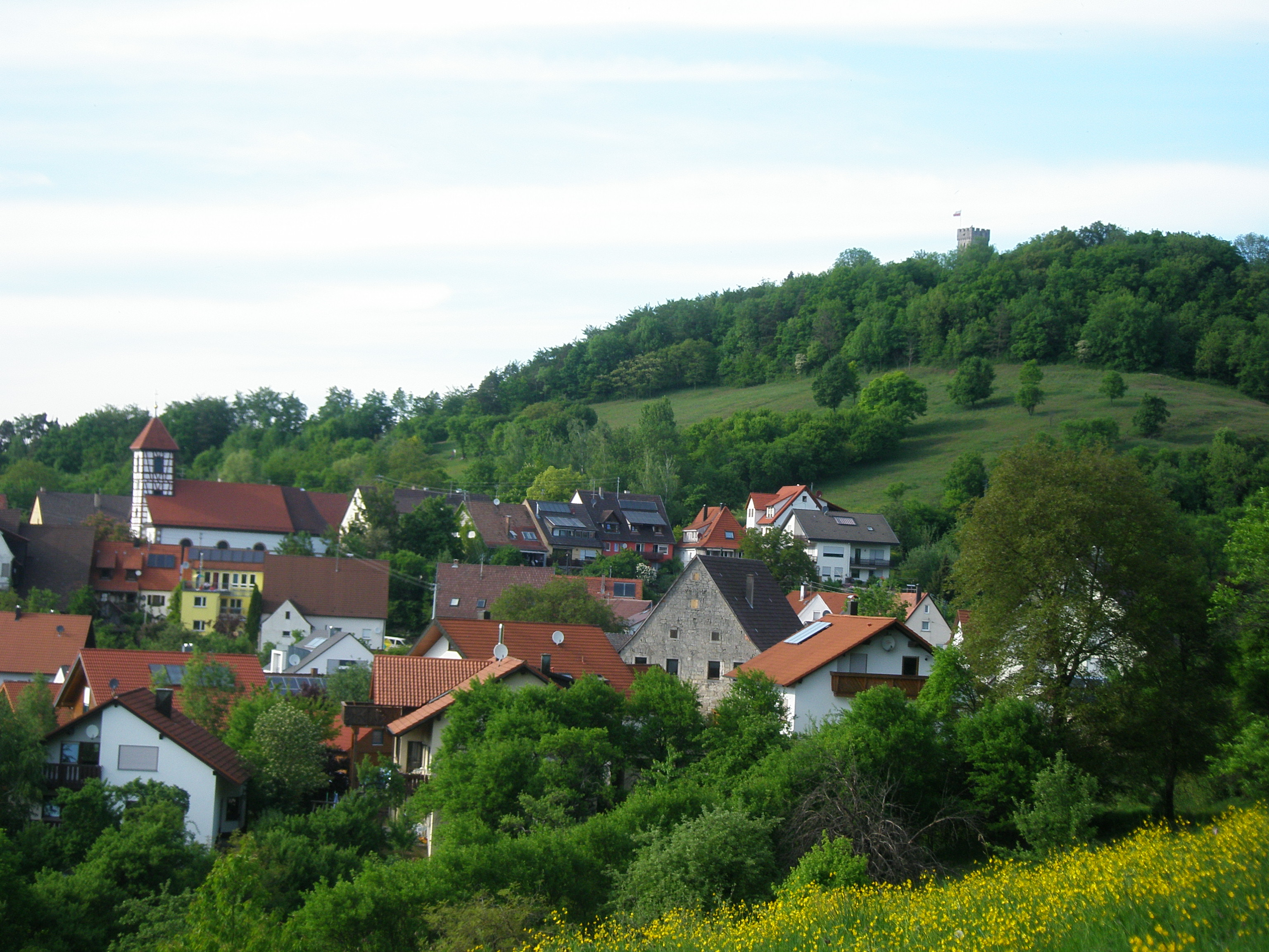 Alter Ortskern von Weiler. Fotografiert aus Richtung Rappenberg.